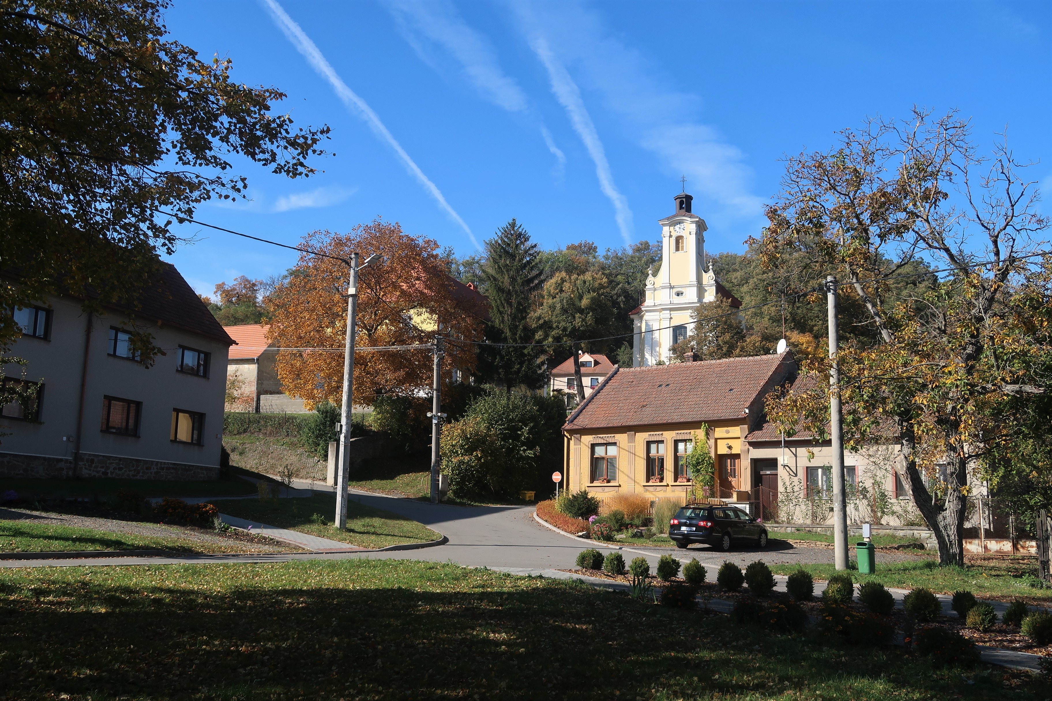 Náves v Lulči s barokním kostelem sv. Isidora (1739)